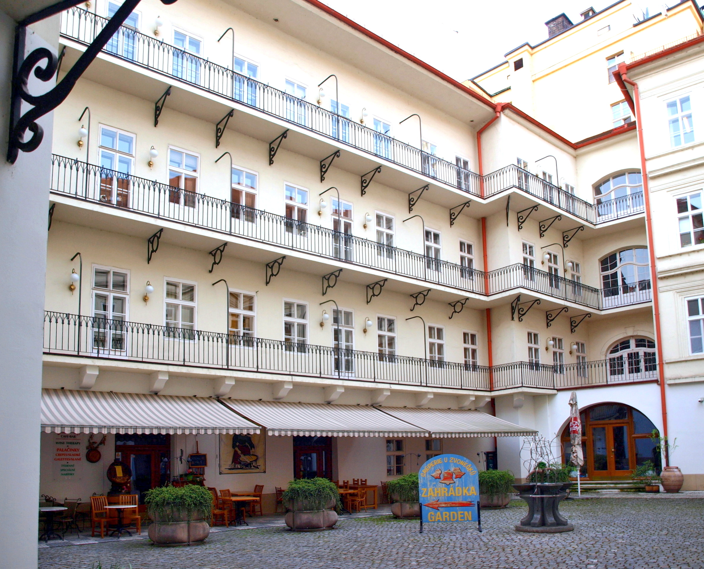 Palác Portheim-Desfours